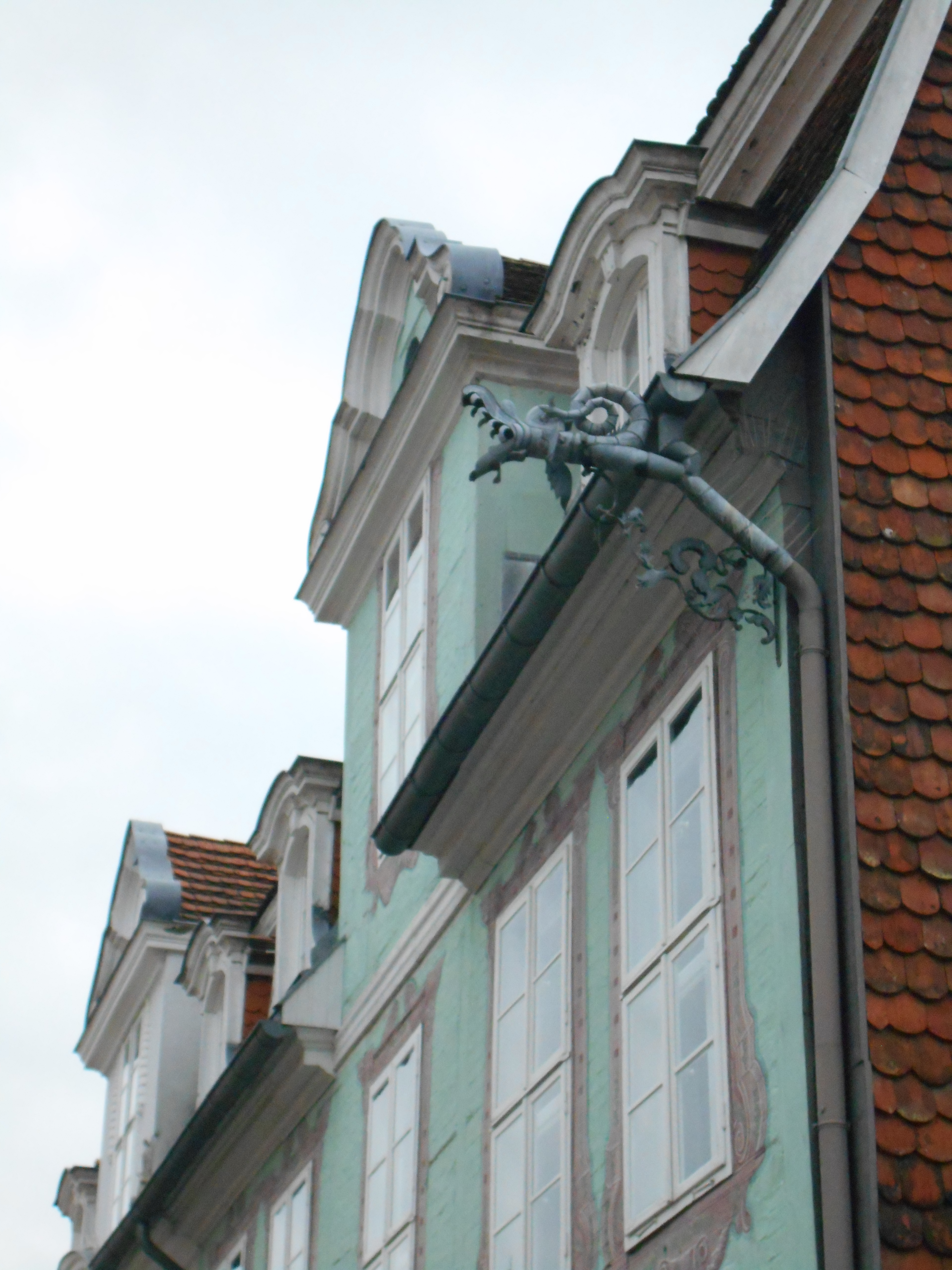 Haus der Kirche Güstrow - Dachansatz der Fassade